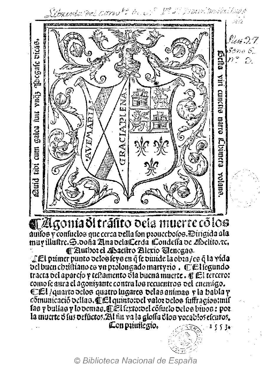 Título: Agonia d[e]l trāsito dela muerte cō los auisos y consuelos que cerca della son prouechosos ... author el Maestro Alexio Venegas ... ; al fin va la glossa dē los vocablos escuros [sic] ... Autor: Venegas, Alejo Fecha: 1553 Datos de edición: Fue impressa ... en ... Toledo en casa de Iuan de Ayala ... Ayala, Juan de (fl. 1530-1556)